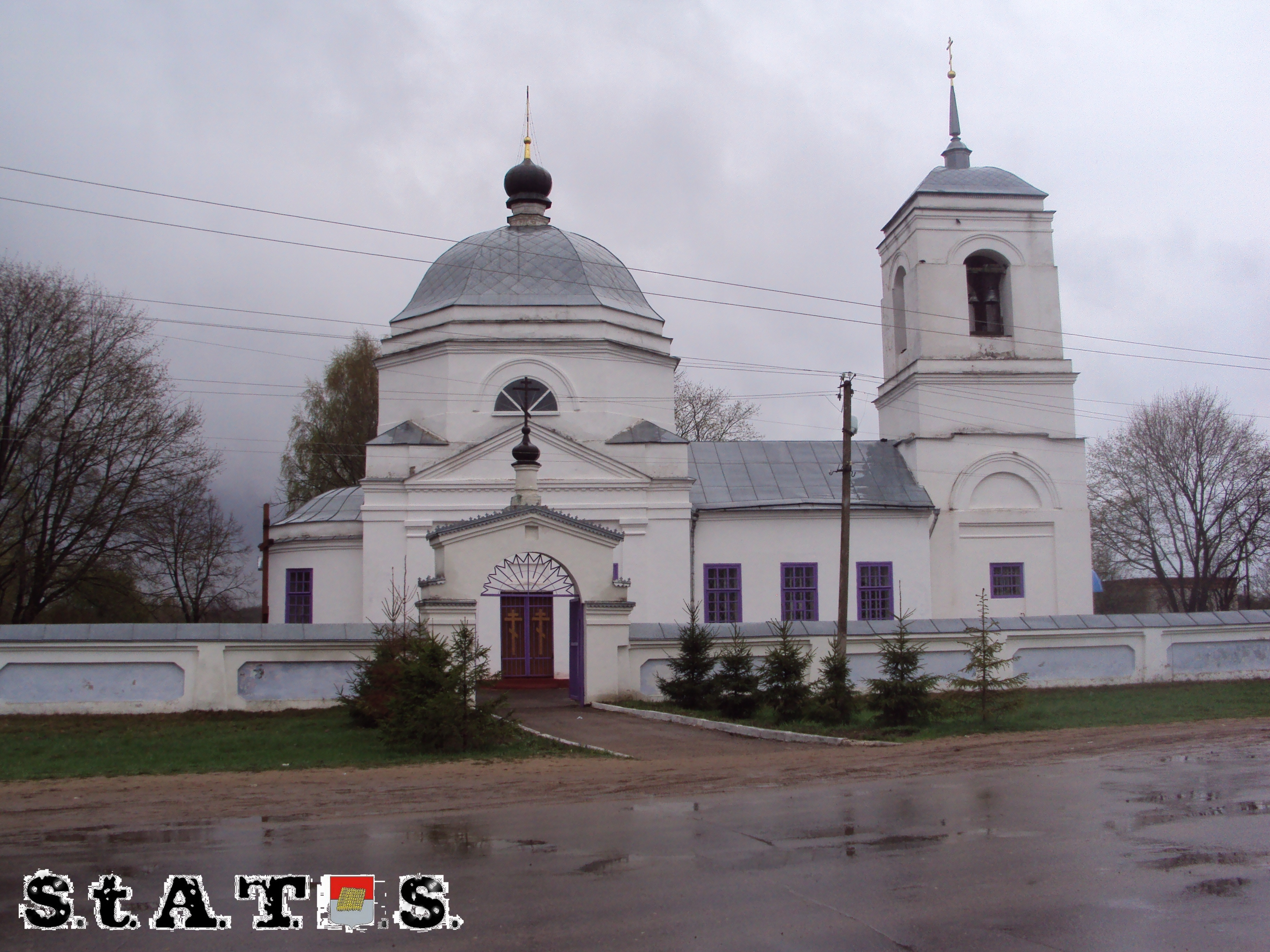 Церковь петра и павла (Смоленская область, Дорогобуж, окраина города)